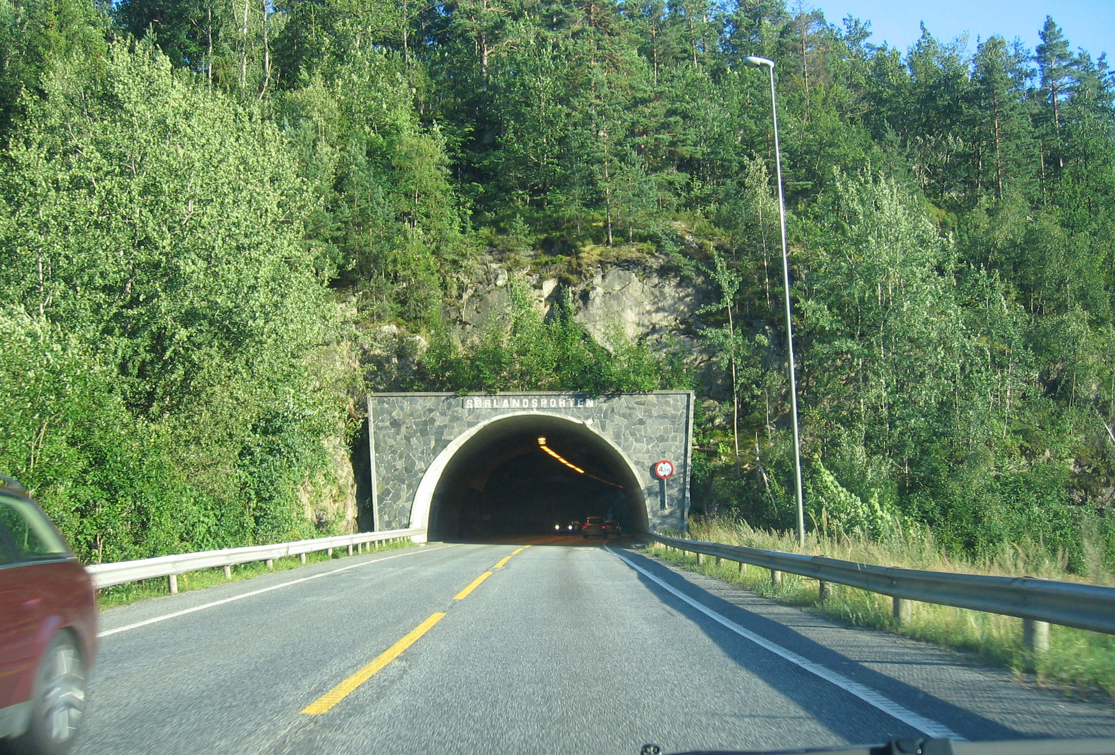 Sørlandsporten in Risør